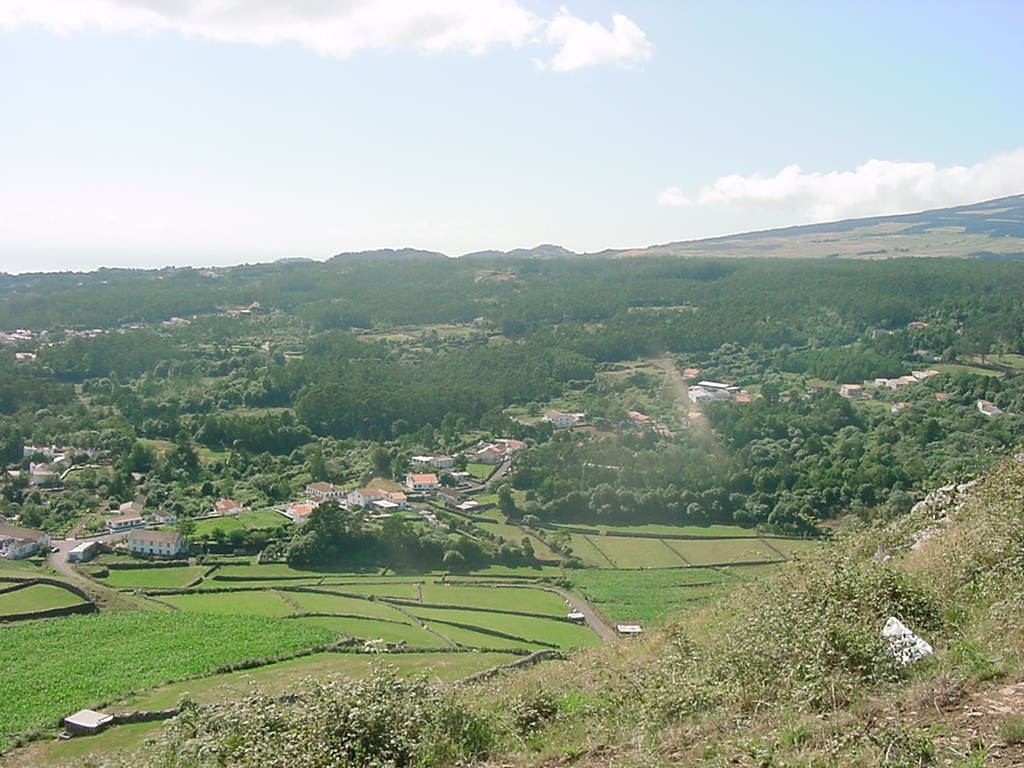 Miradouro das Veredas, vista sobre a freguesia da Terra chã, ilha Terceira, Açores, portugal.